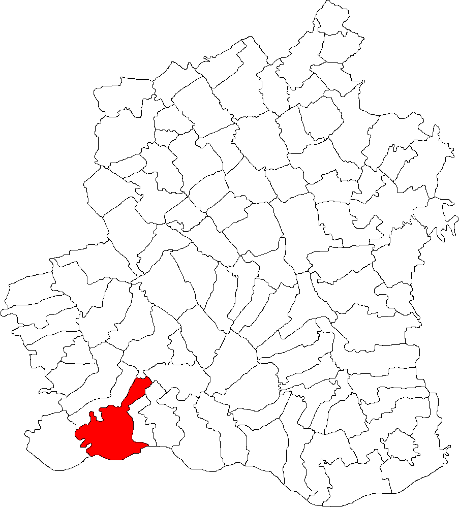 Categorie:Hărţi ale judeţului Teleorman